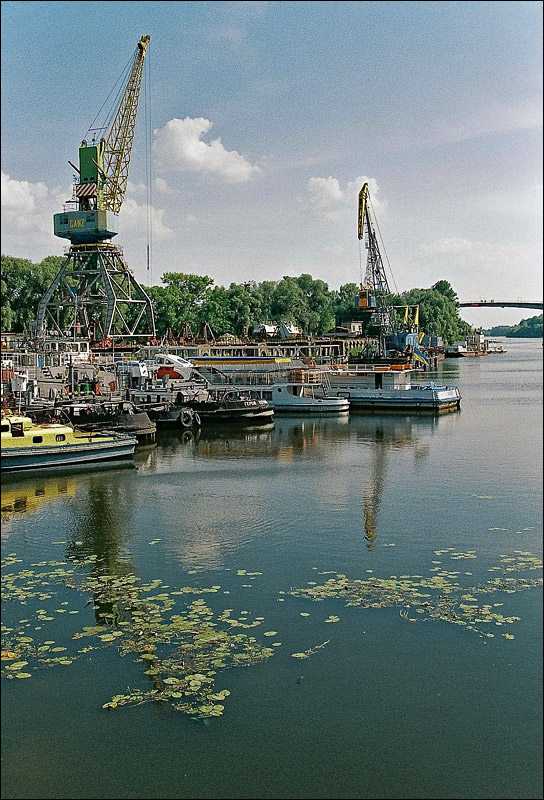 Речной порт Чернигова